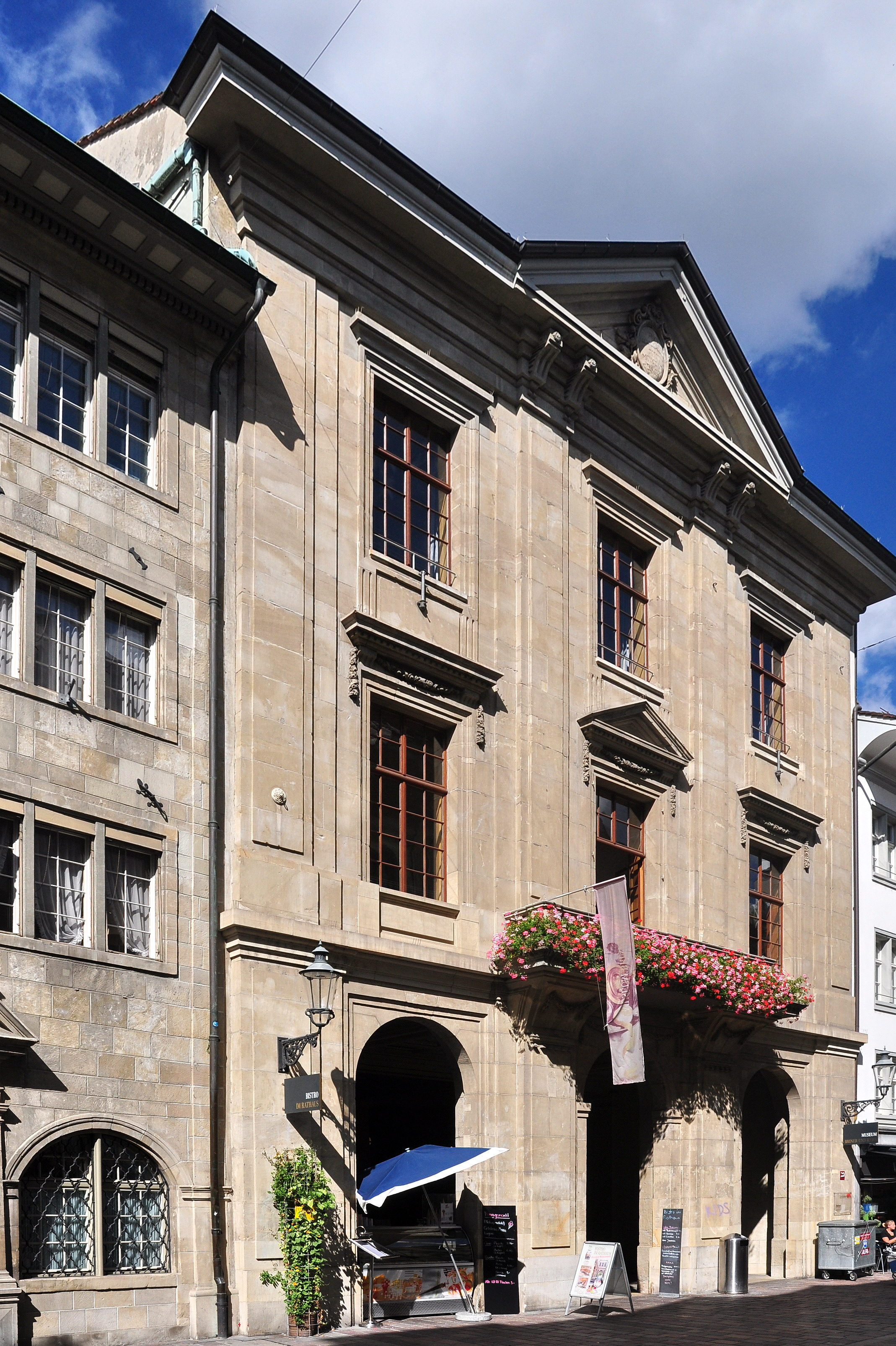 Rathaus, Marktgasse 20 in Winterthur (Switzerland)